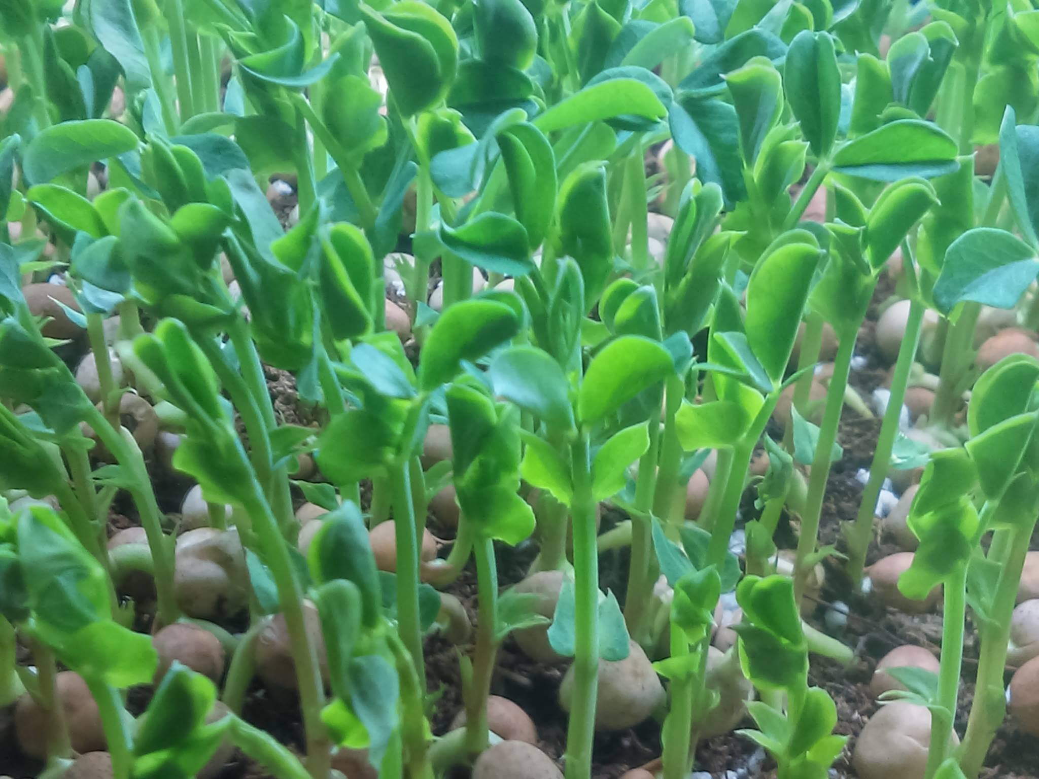 Pea shoots